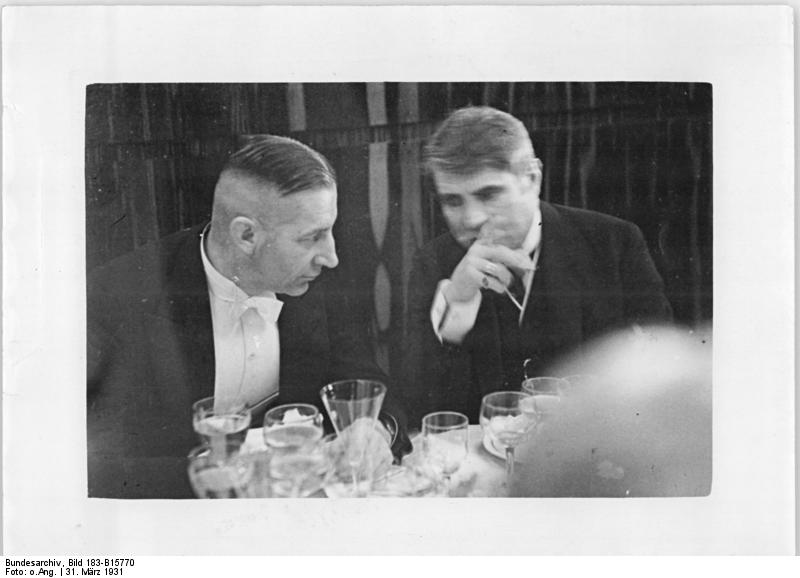 Berlin, Hans Lohmeyer, Hans Baluschek Feierliche Einweihung des neuen Hauses des Reichsverbandes der deutschen Presse in der Tiergartenstr 16. Baluschek (r) und Oberbürgermeister Lohmeyer-Königsberg [?] [Berlin.- Hans Lohmeyer, Hans Baluschek] Abgebildete Personen: Baluschek, Hans Prof.: Maler, Grafiker, Deutschland